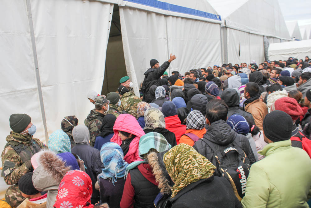 Ministrica za obrambo obiskala nastanitveni center v Šentilju.